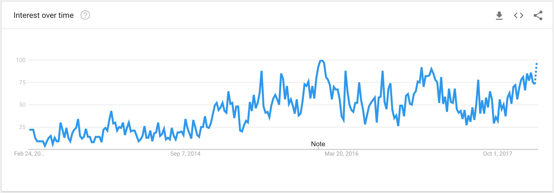 نمودار رشد تقاضا برای شیرینی دانمارکی در 5 سال گذشته